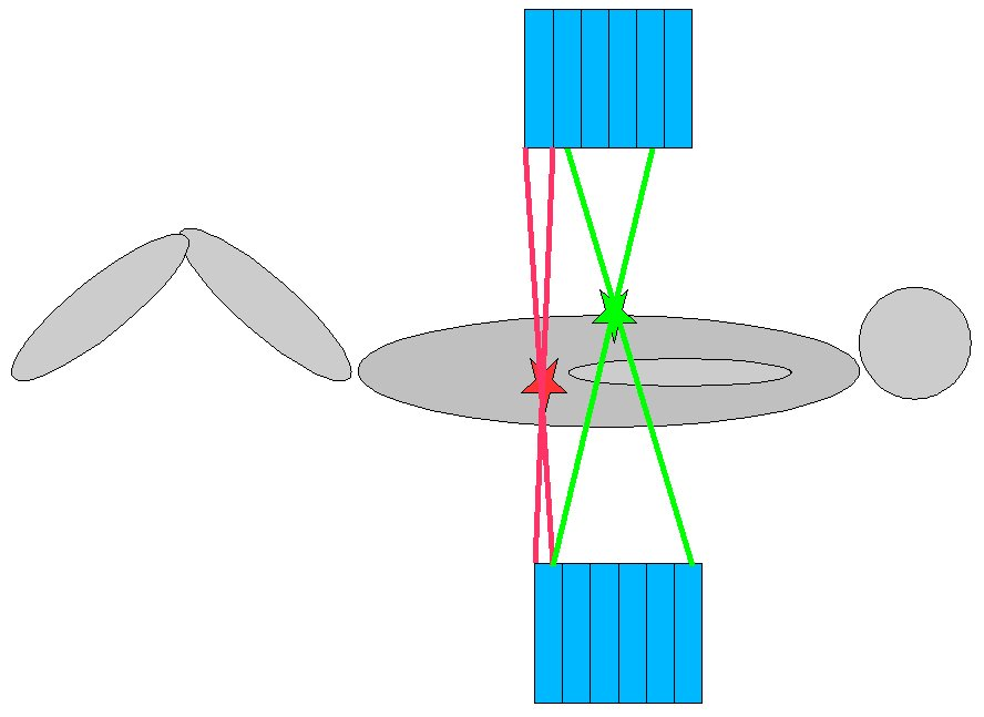 3D acquisition mode in PET imaging